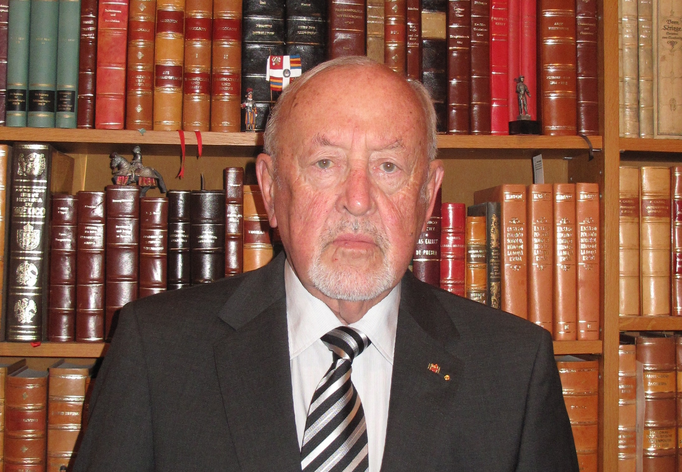 Porträtfotografie von Dr. phil. Philipp W. Fabry